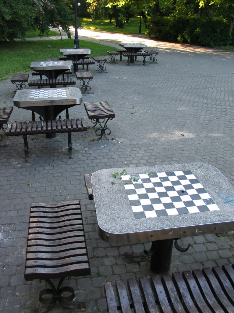 Park ŚledziaŁódź